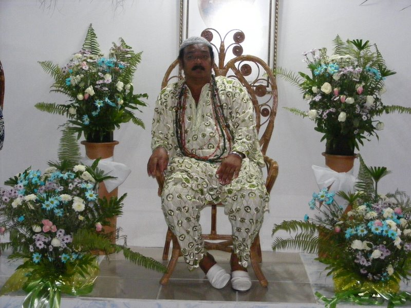 Babalorixá Aristides Mascarenhas